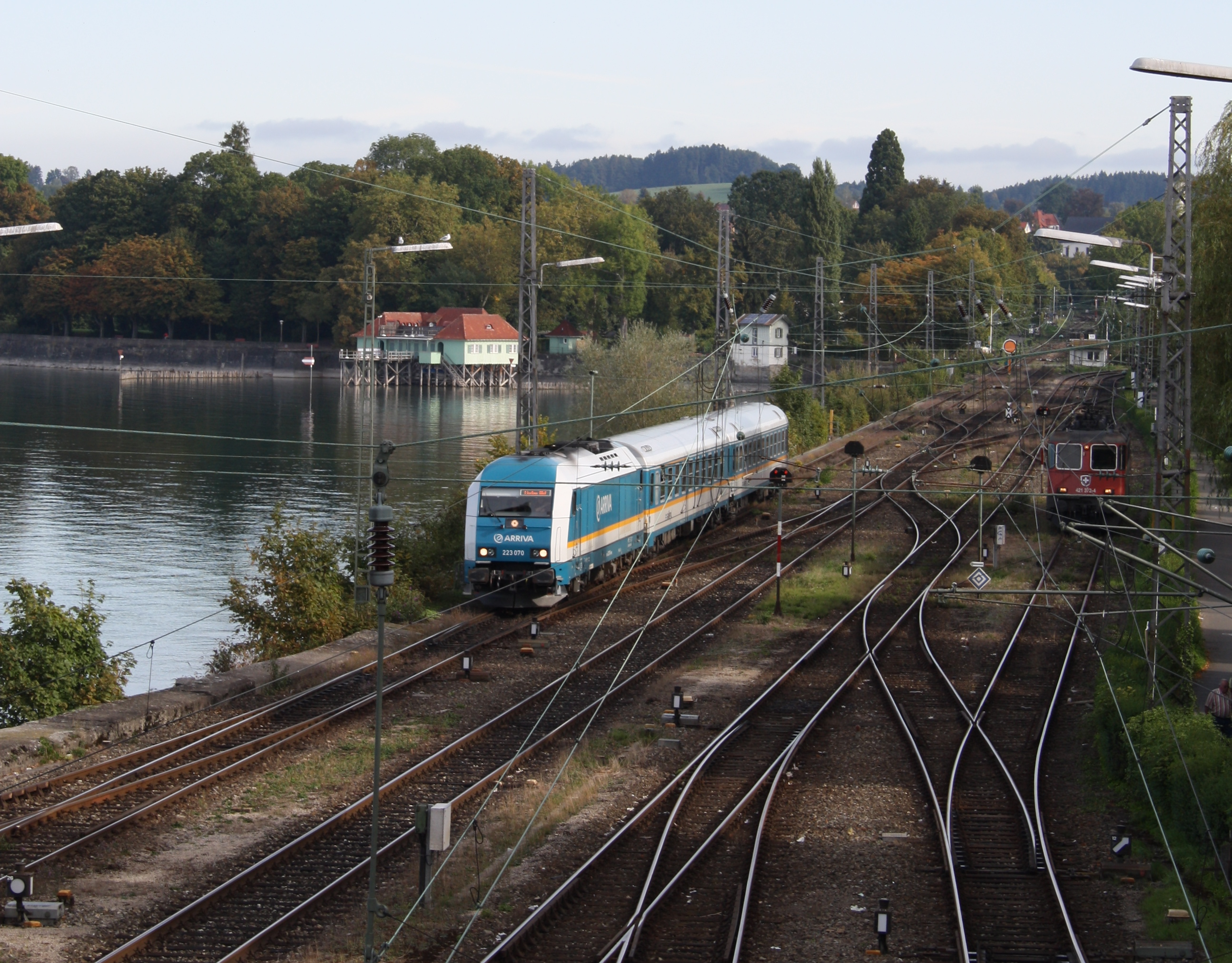 Dammstrecke Lindau